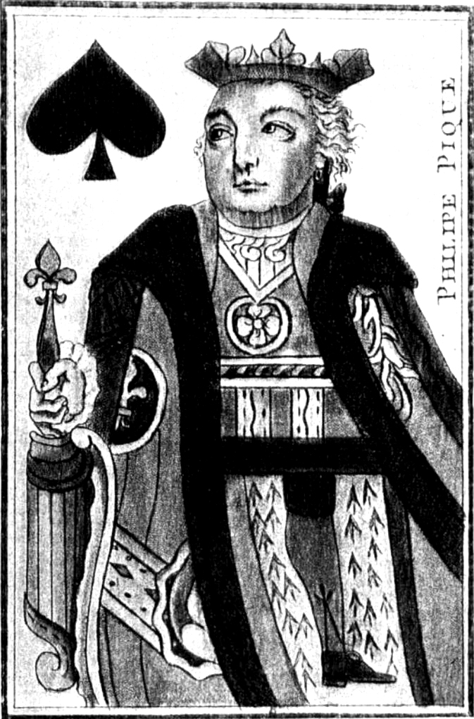 "Philippe Pique" Caricature of Louis Philippe II, Duke of Orléans, aka "Philippe Égalité"